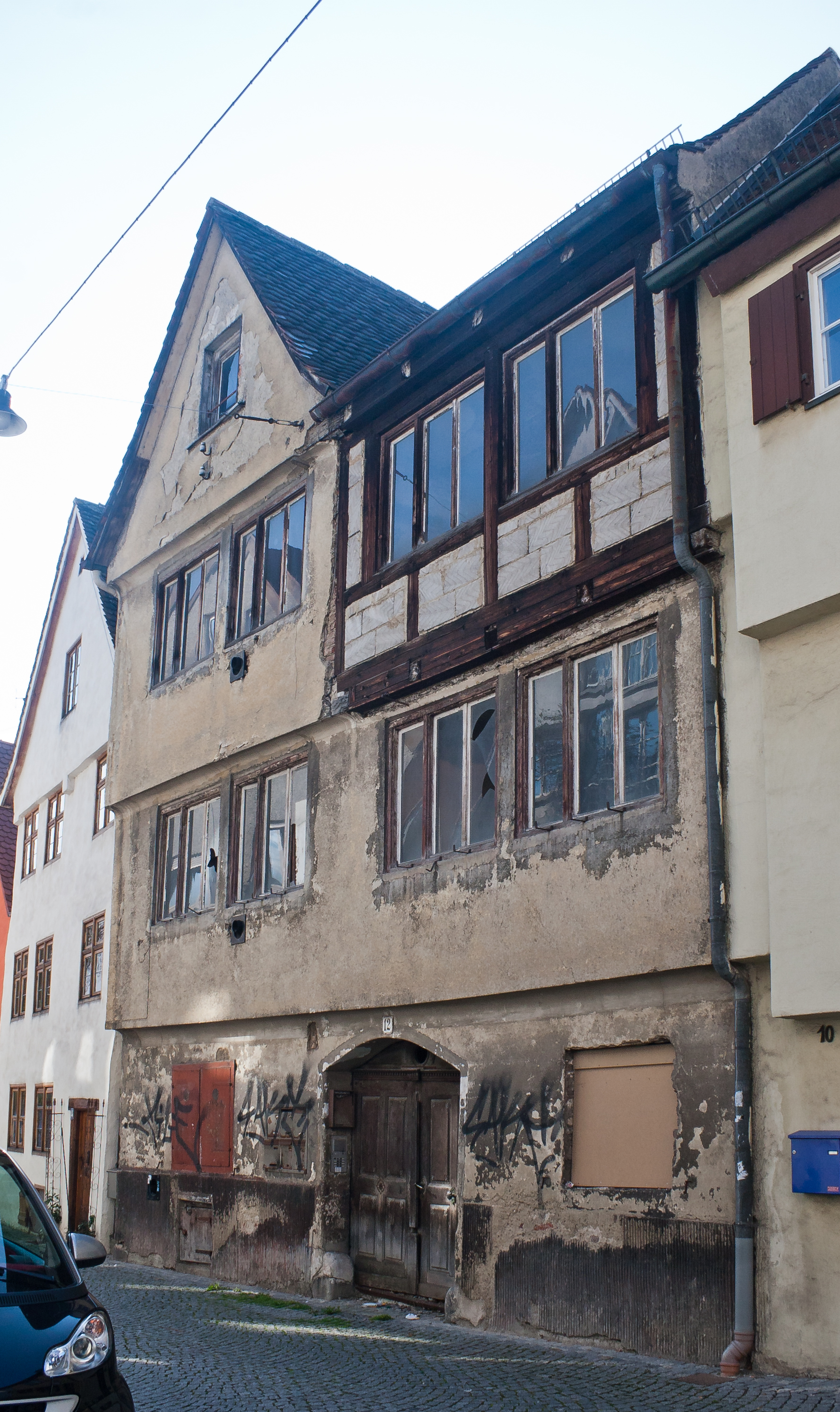 Ulm, Baden-Württemberg, Germany